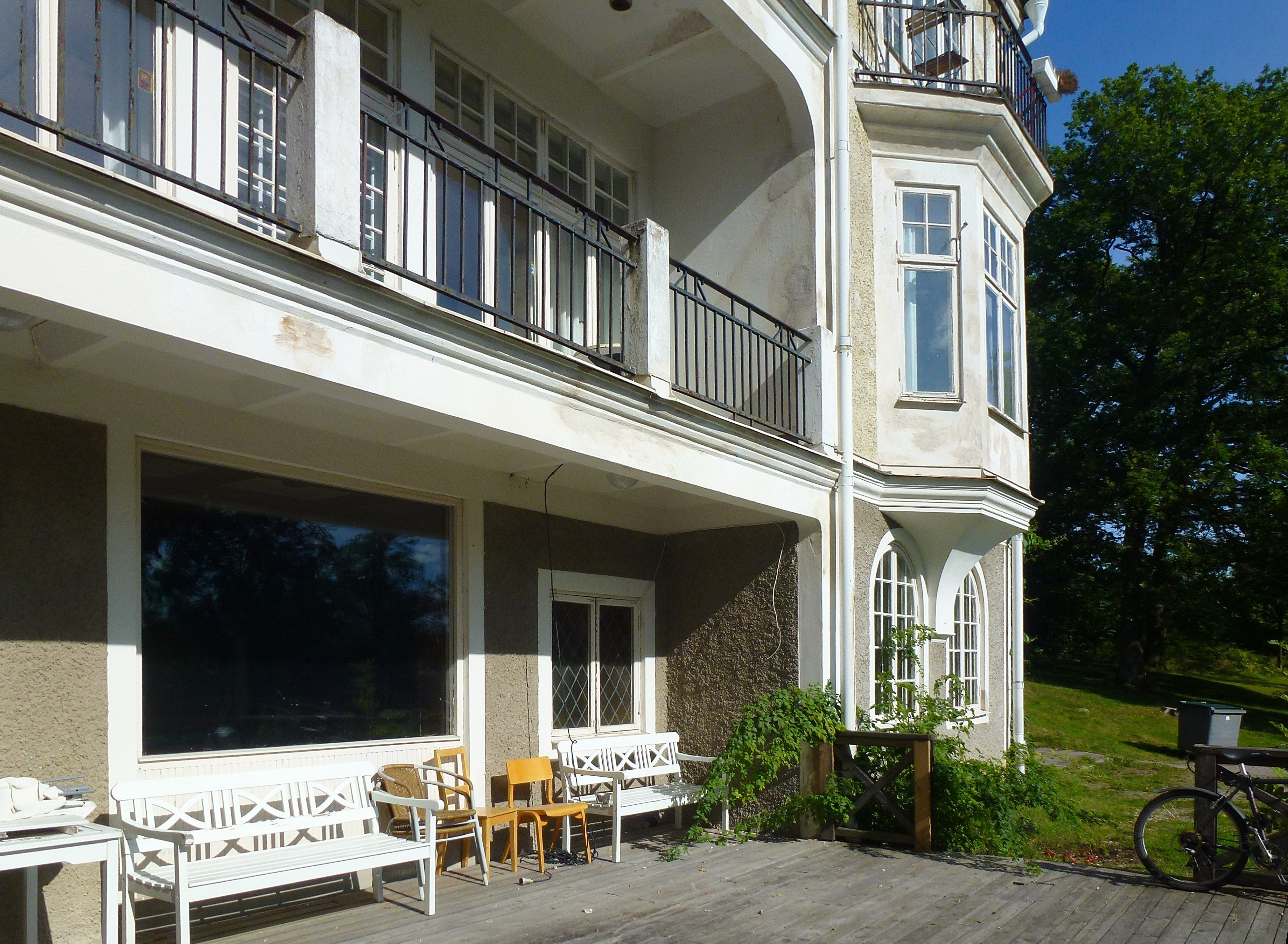 Villa Strandvik i Gustavsberg, arkitekt Ferdinand Boberg, 1911